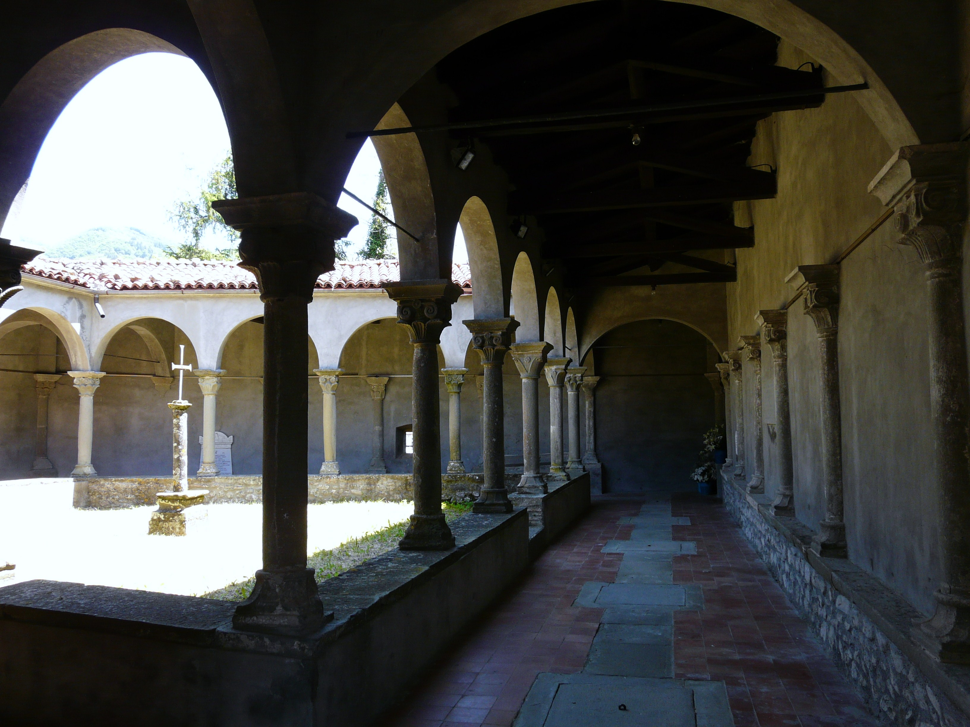 Chiostro della chiesa dei Santi Sisto e Margherita, Villa Collemandina, Toscana, Italia